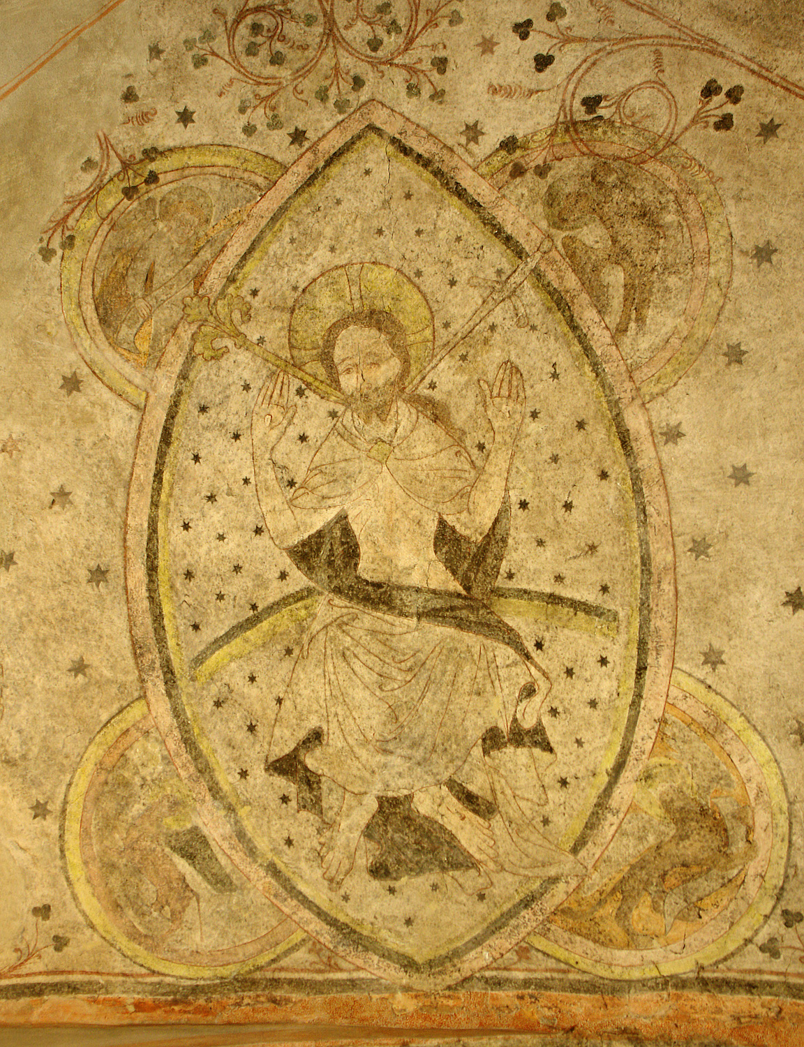 Gotische Wandmalereien (um 1414) im Bremer Dom (Museum): Thronender Christus in der Mandorla (Offb. 1,16)